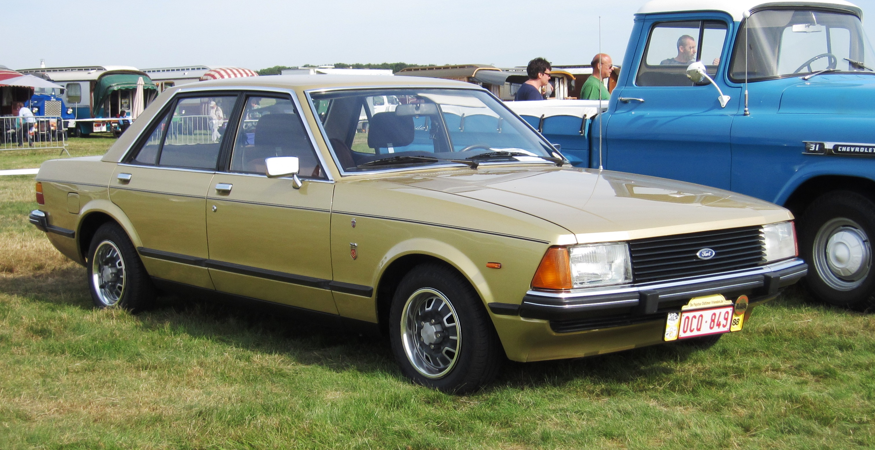 Ford Granada V6 MkII